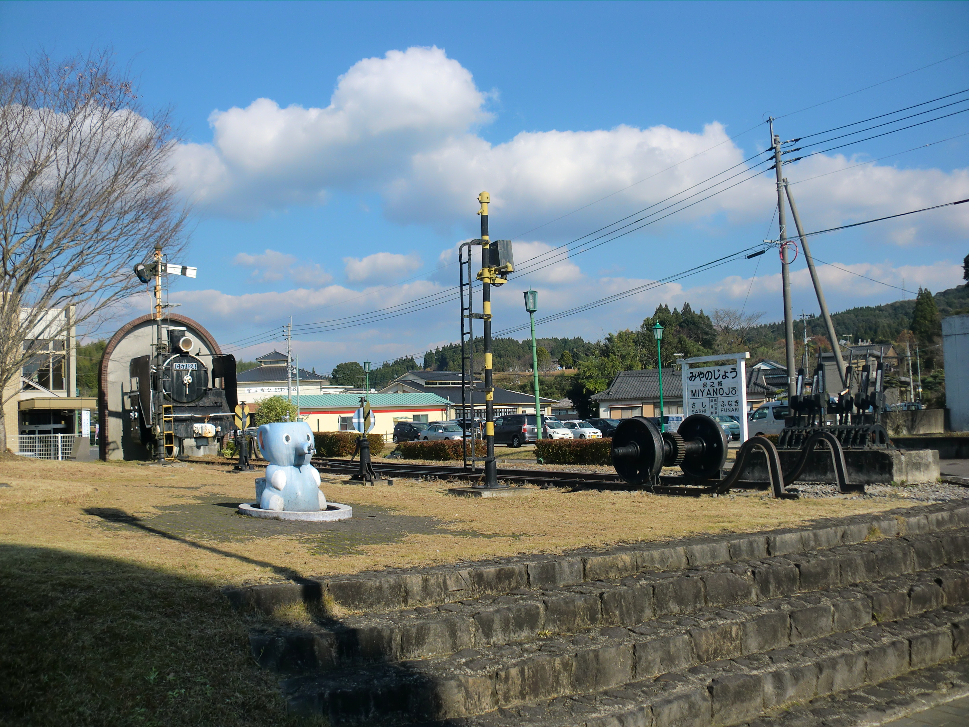 宮之城線宮之城駅跡